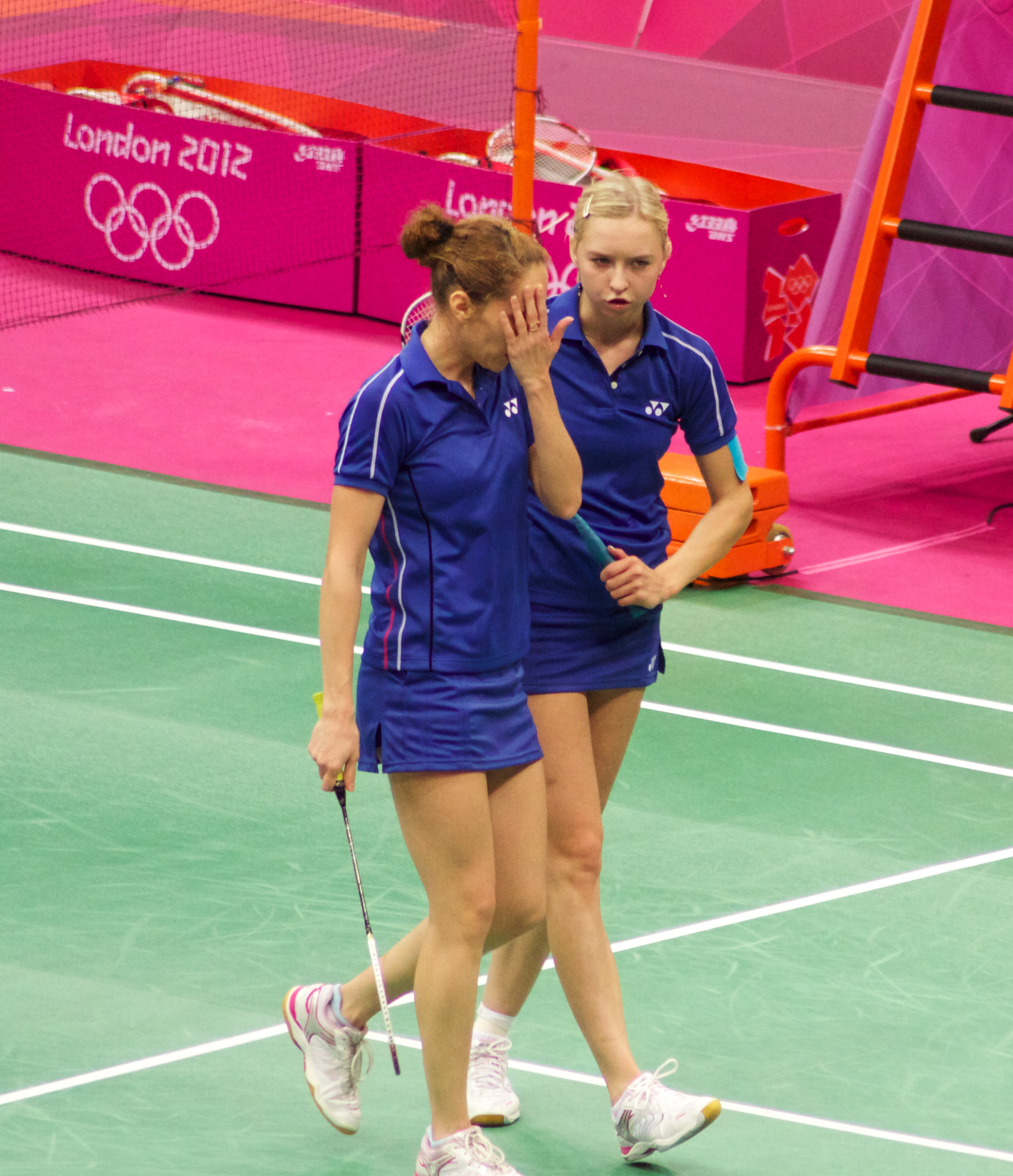 Nina Vislova and Valeria Sorokina